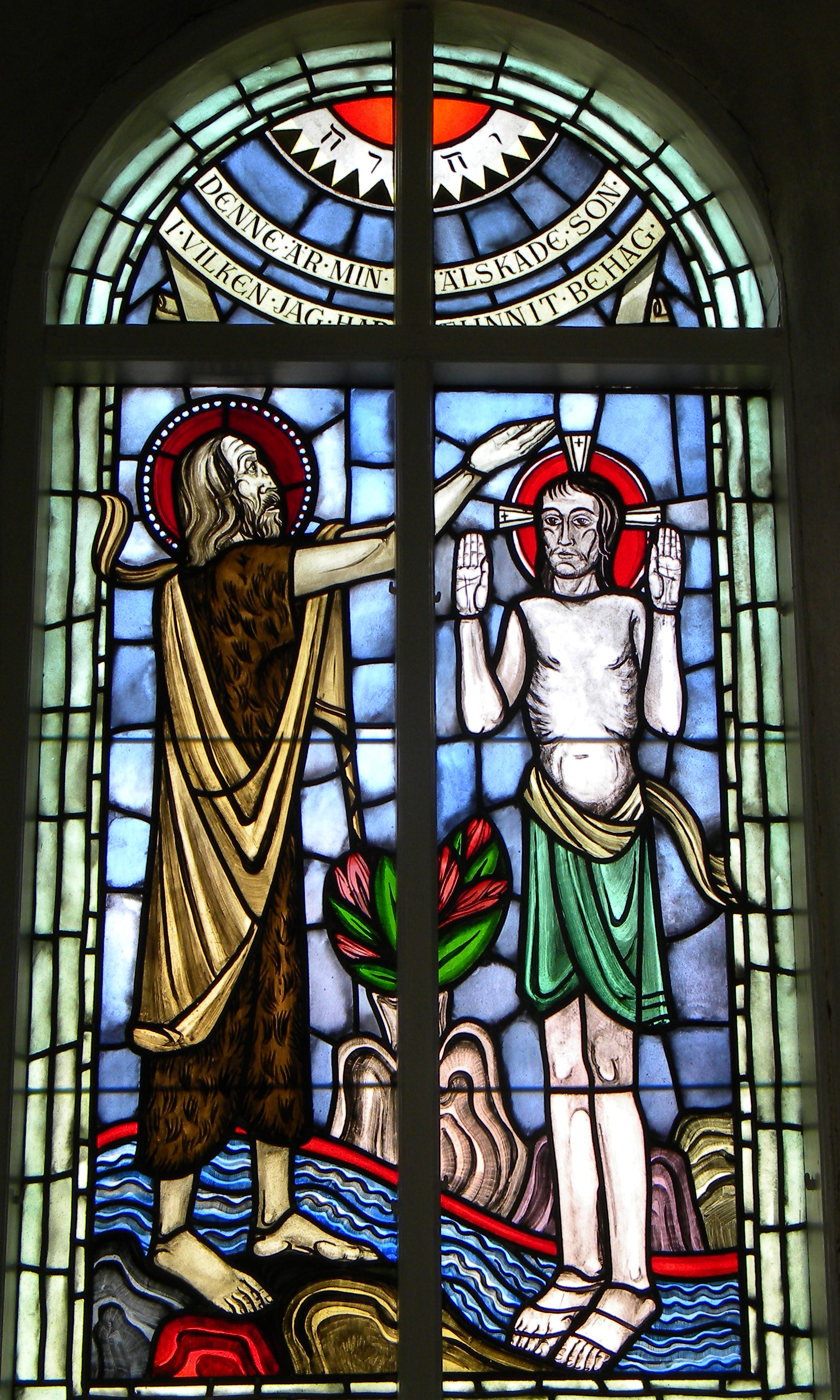 Stoby kyrka - Korfönster från 1935 av Hugo Gehlin med tetragrammet JHWH högst upp